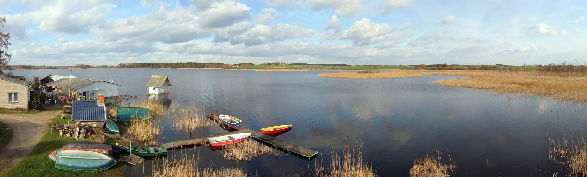 Parsteiner See